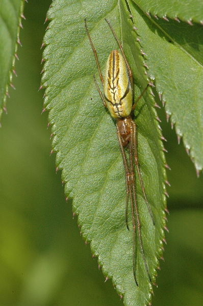 female Tetragnatha extensa from Commanster, Belgian High Ardennes .